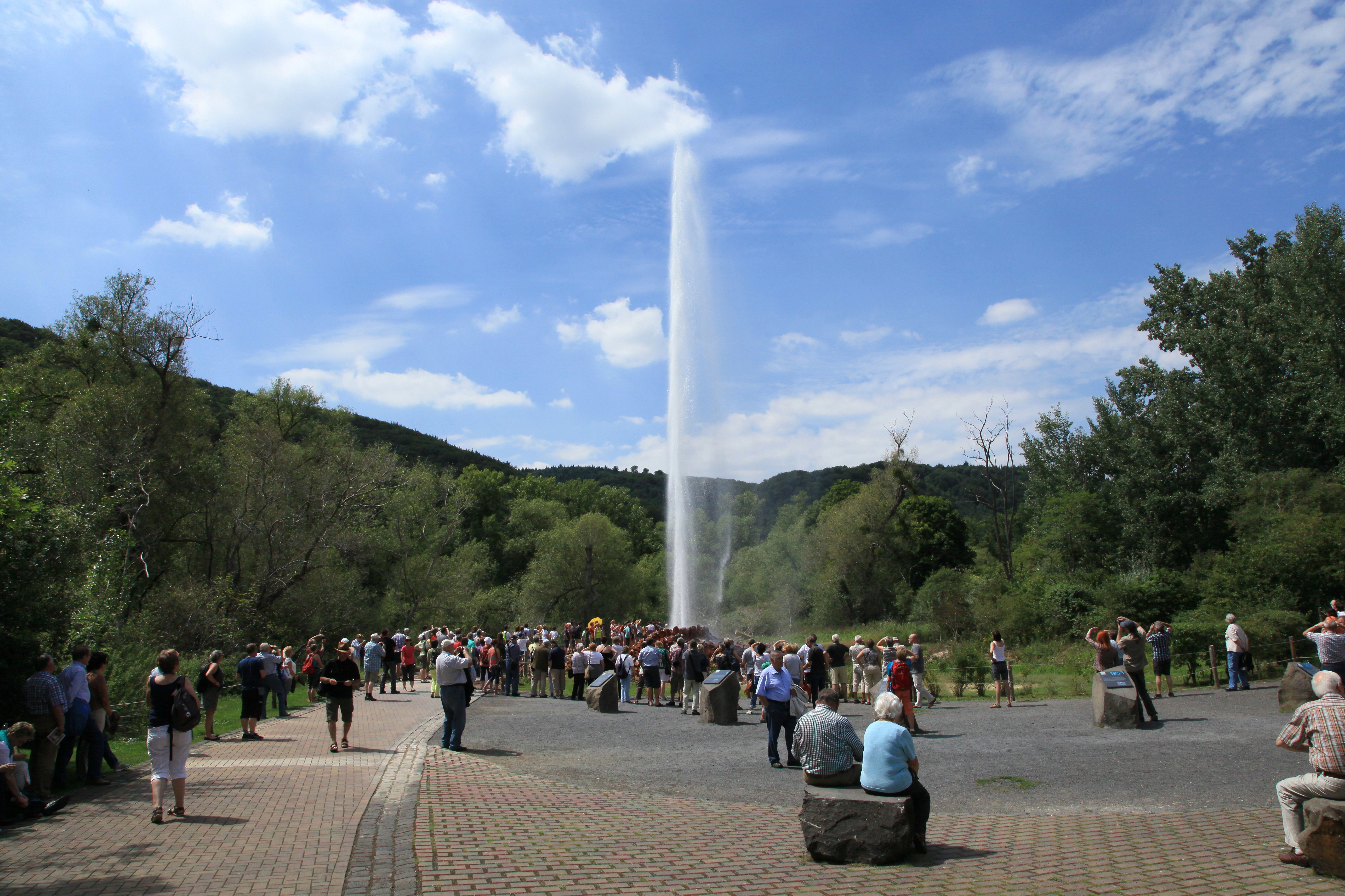 Geysir auf dem Namedyer Werth in Andernach